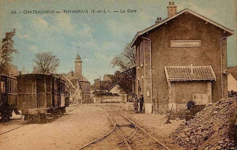 Carte postale ancienne éditée par G. Foucault à Dreux : Châteauneuf-en-Thymerais - La Gare (Tramways d'Eure-et-Loir).